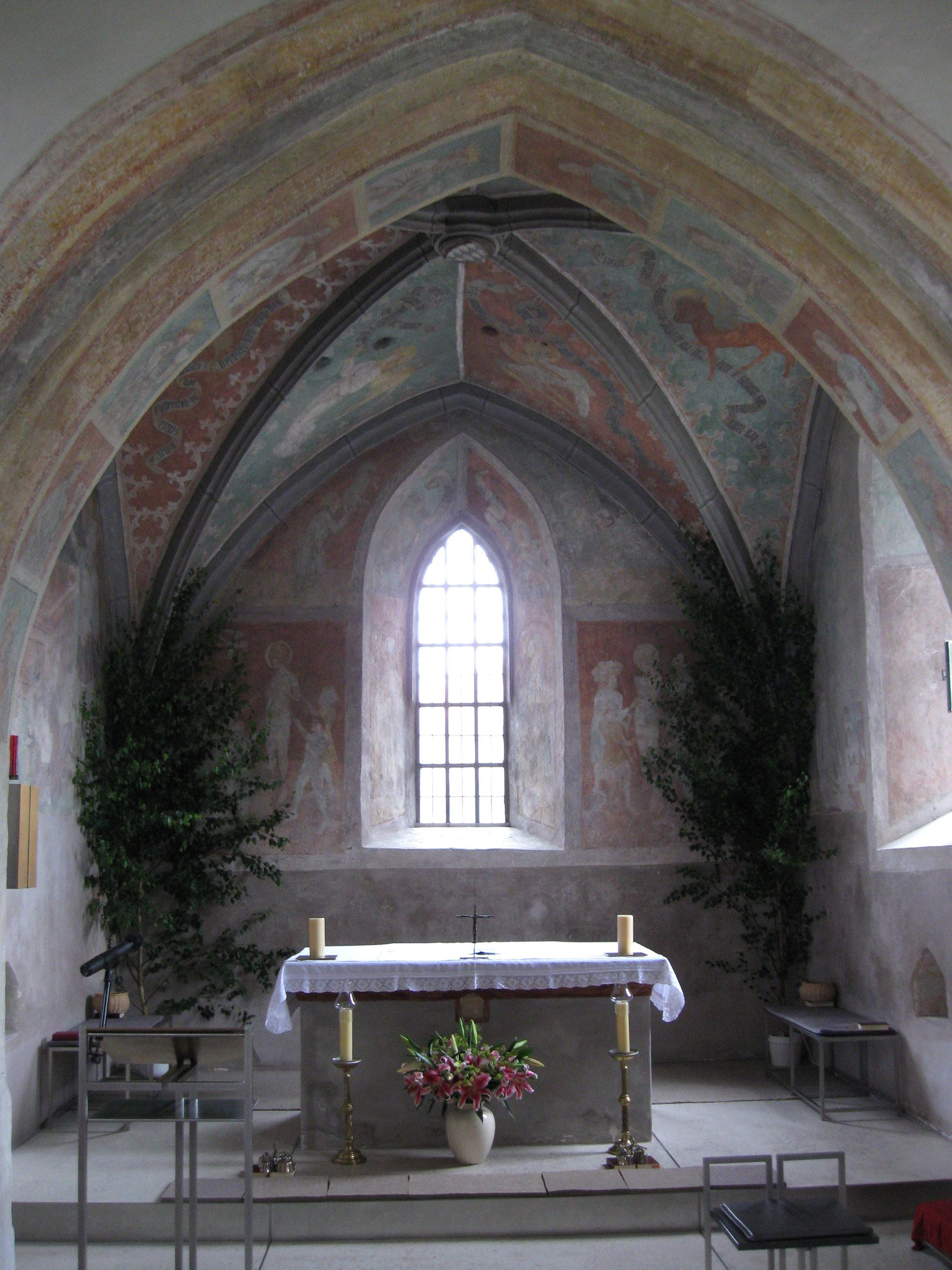 Altkirchen, Oberbiberger Straße 10; Kath. Kuratiekirche St. Margaretha, Langhaus im Kern 11./13. Jh., nach Westen erweitert 1965, Chorturm 15. Jh., Barockisierung der Anlage 1680; mit Ausstattung; Friedhof mit Ummauerung. Innenraum